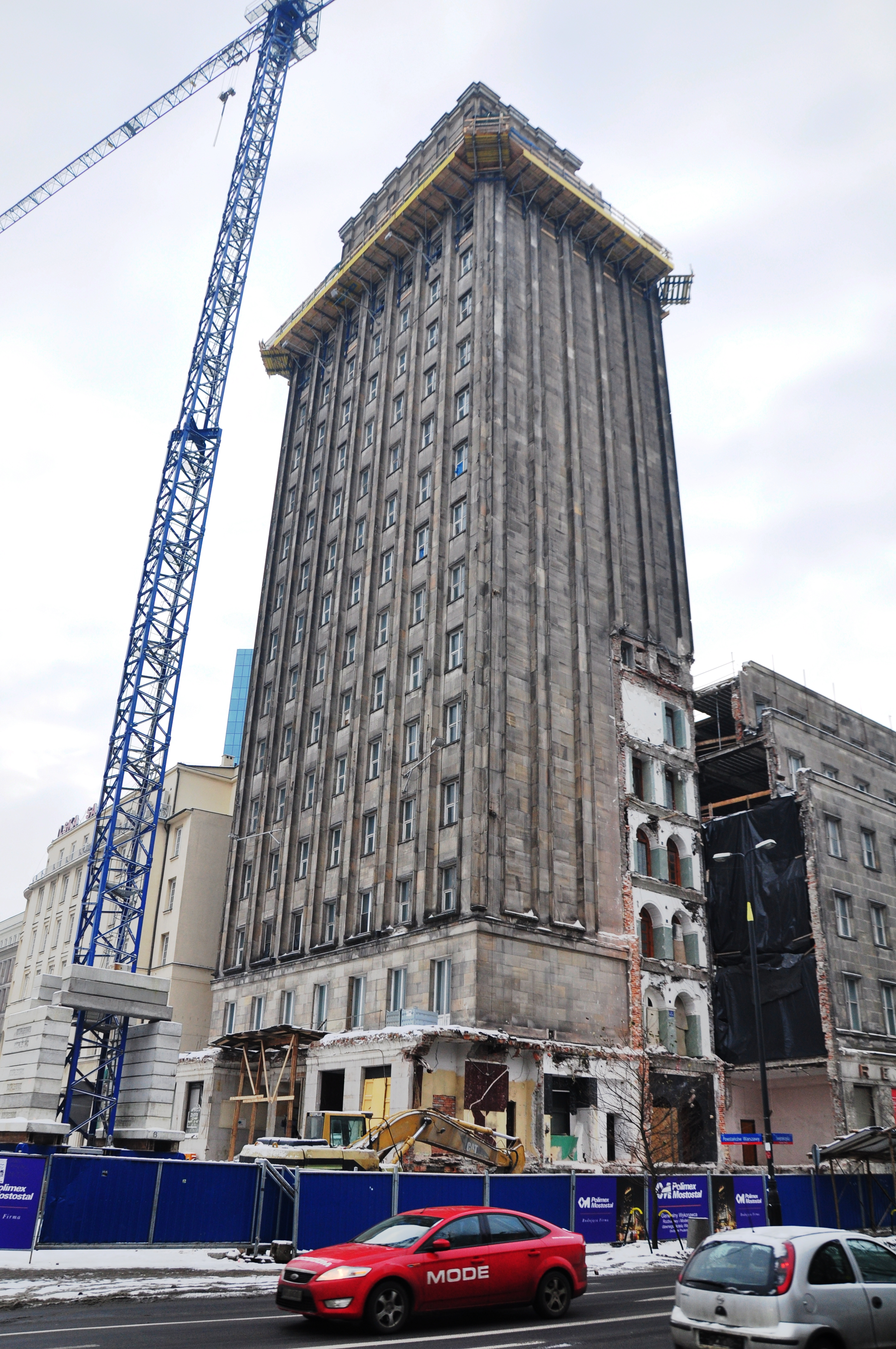 Teilabriss des Prudeential-Hochhauses in Warschau zwecks Sanierung/Neunutzung/Umbau